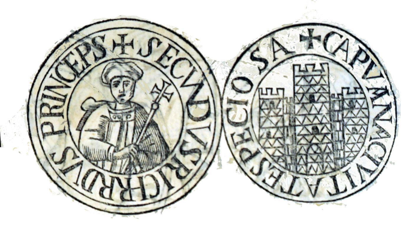 extrait du "nouveau traité de diplomatique" tome 4.